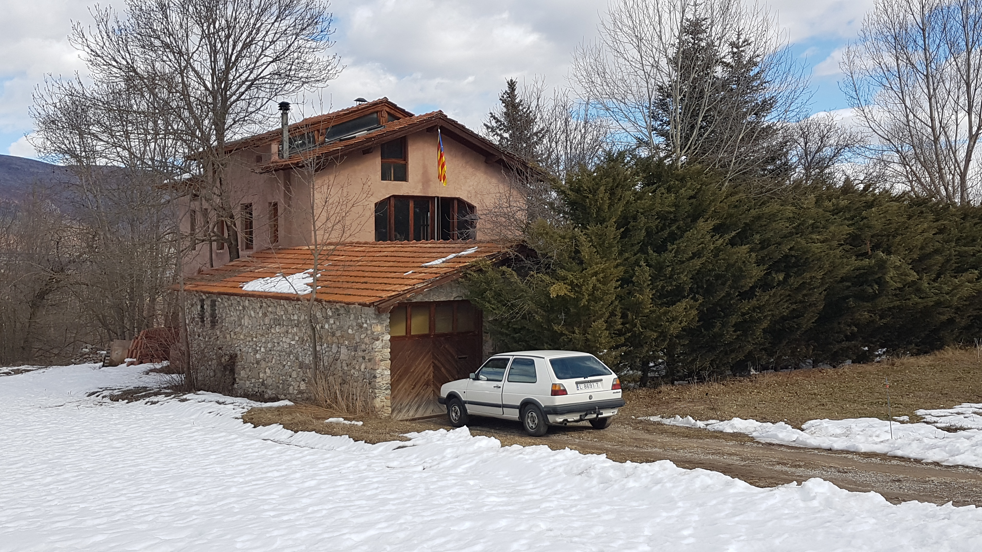 Fotografia actual de l'antiga escola d'Olià